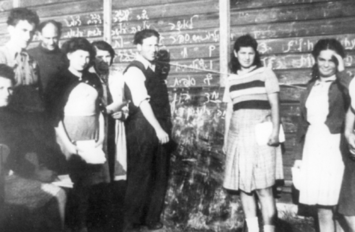 פלי"ם ספינות המעפילים ג - אקסודוס - ספינות המעפילים – אקסודוס יציאת אירופה תשז - חוגי לימוד במחנה המעצר באמסטאו